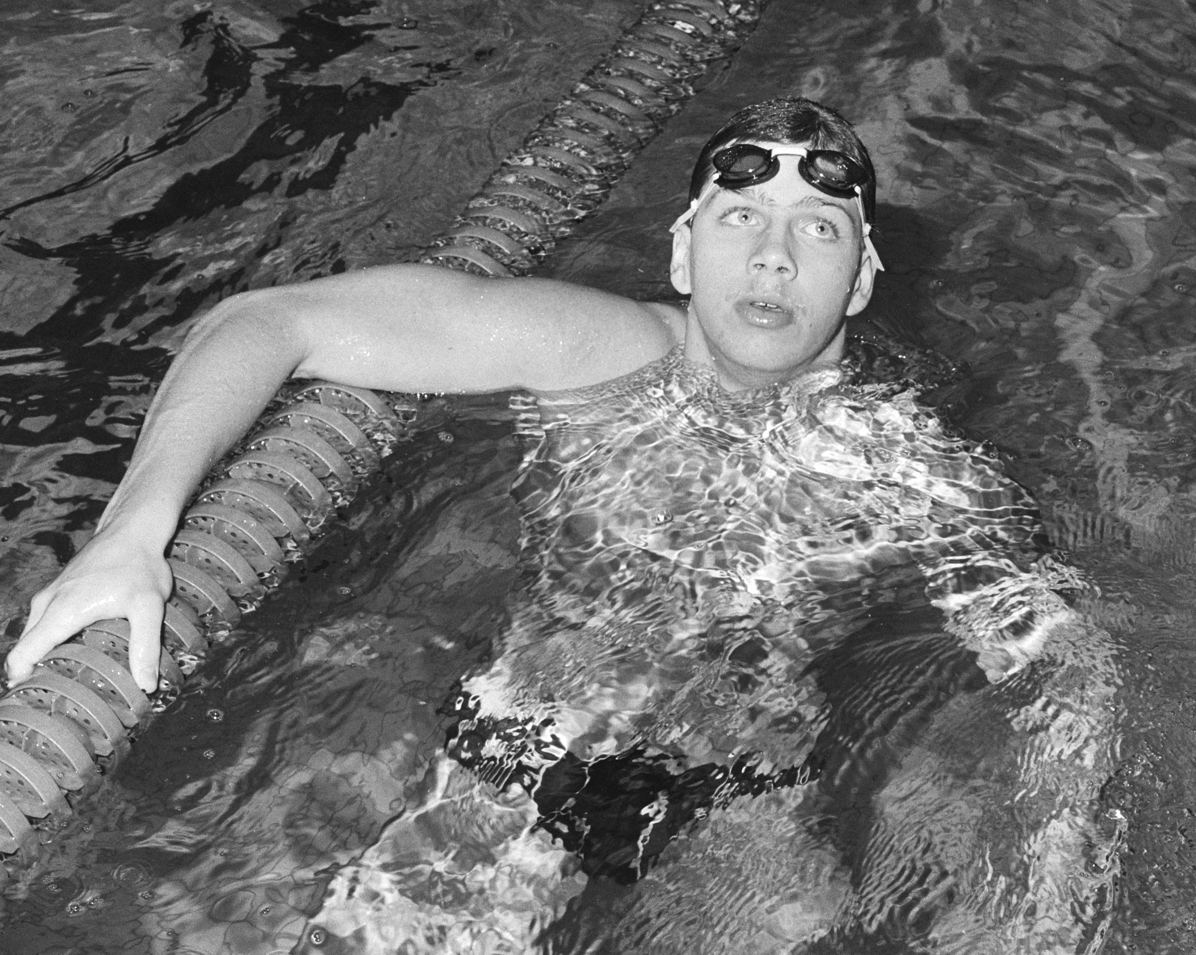 Speedo Meet zwemmen, Amersfoort; nr. 10 Edward Schlingemann na 100 m rug